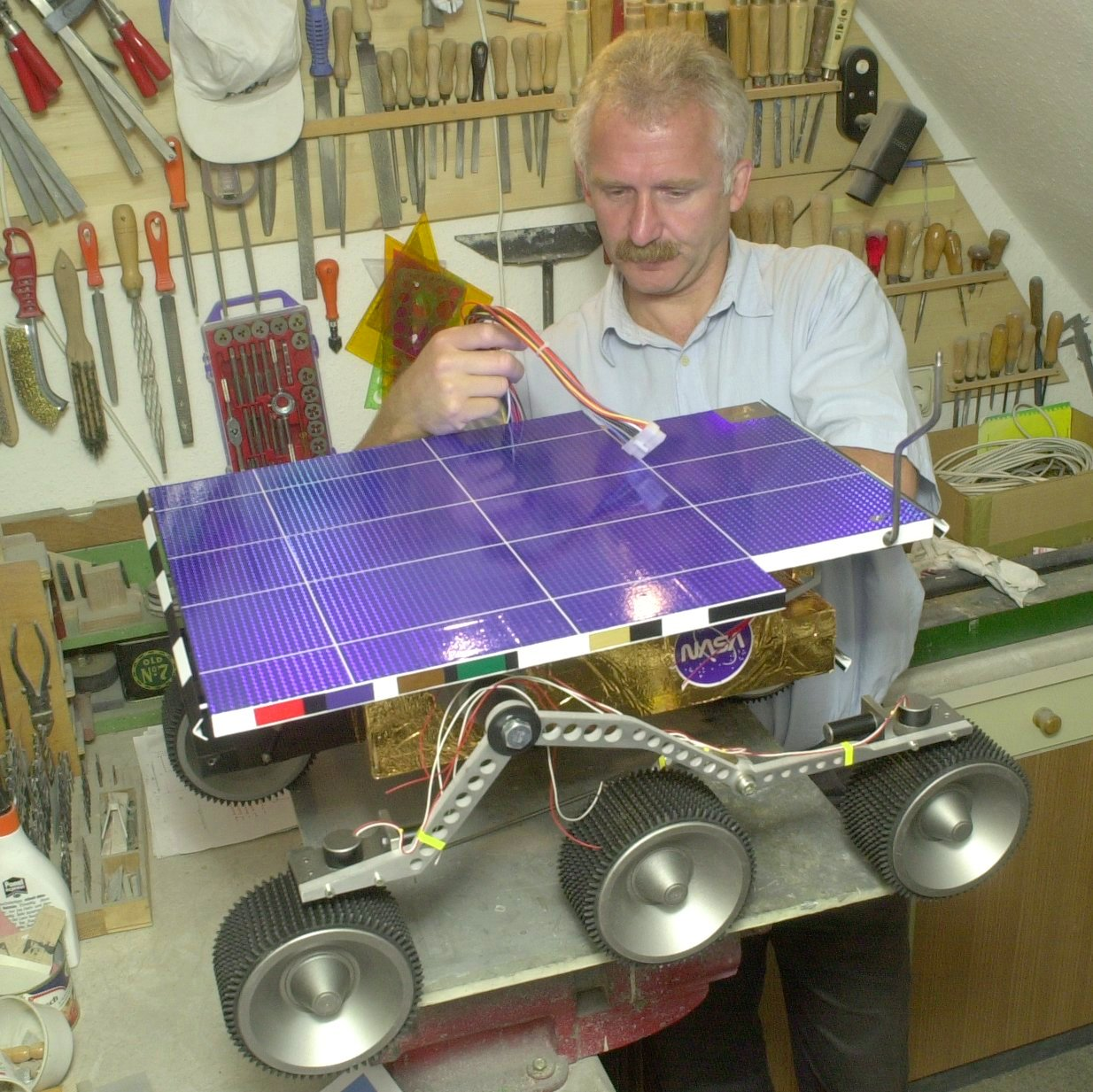 Das kleine "Marsauto" landete im Juli 1997 auf dem Nachbarplaneten und arbeitete dort 83 Marstage lang. Tasillo Römisch hat es (nicht fahrtüchtig) nachgebaut und auf vielen Ausstellungen gezeigt.